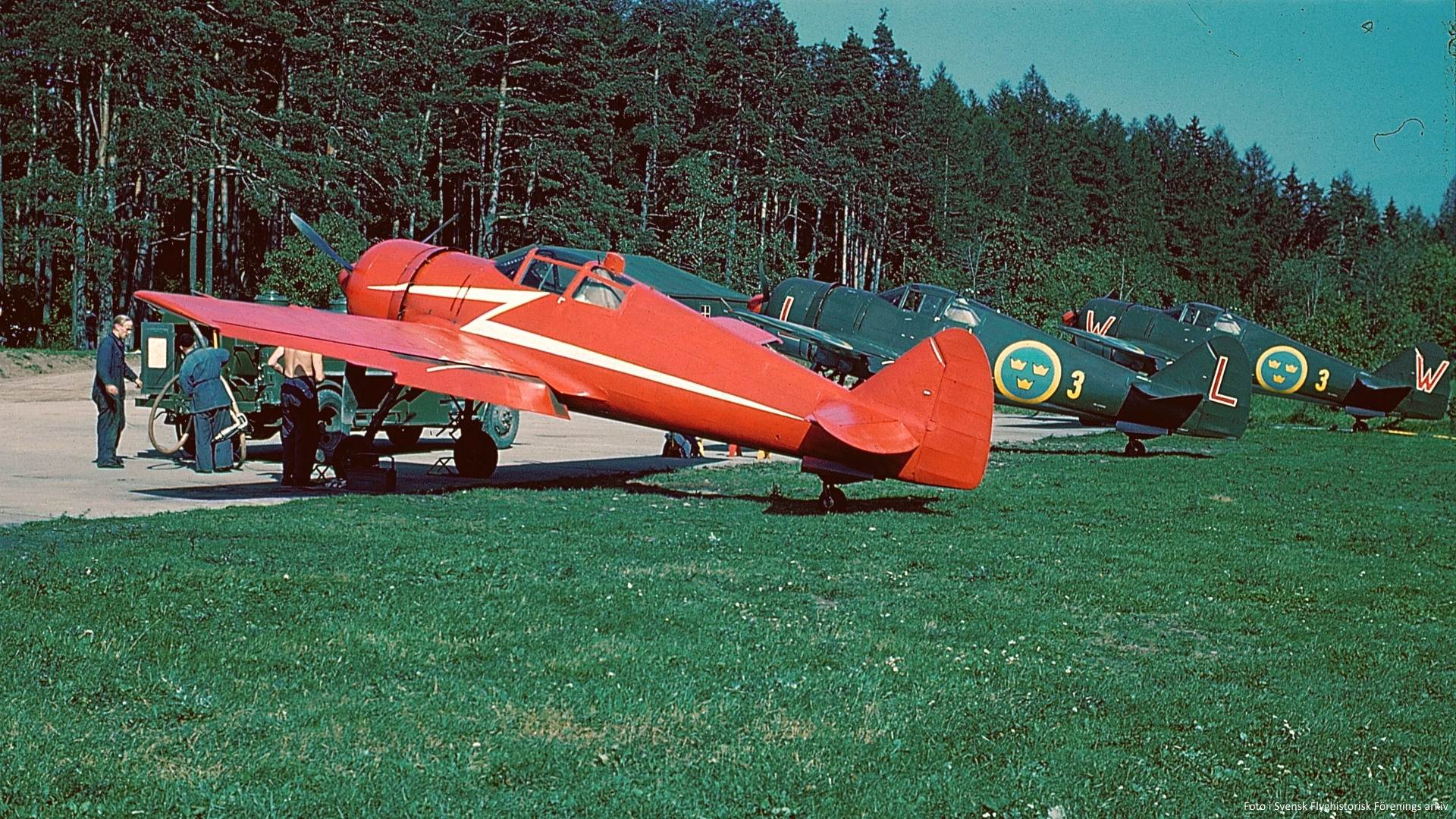 FFVS J 22B "Röda blixten" inför flygvapnets 25-års jubileum 1951. Fotot kommer från Svensk Flyghistorisk Förenings arkiv med godkänande för wikipedia användning.